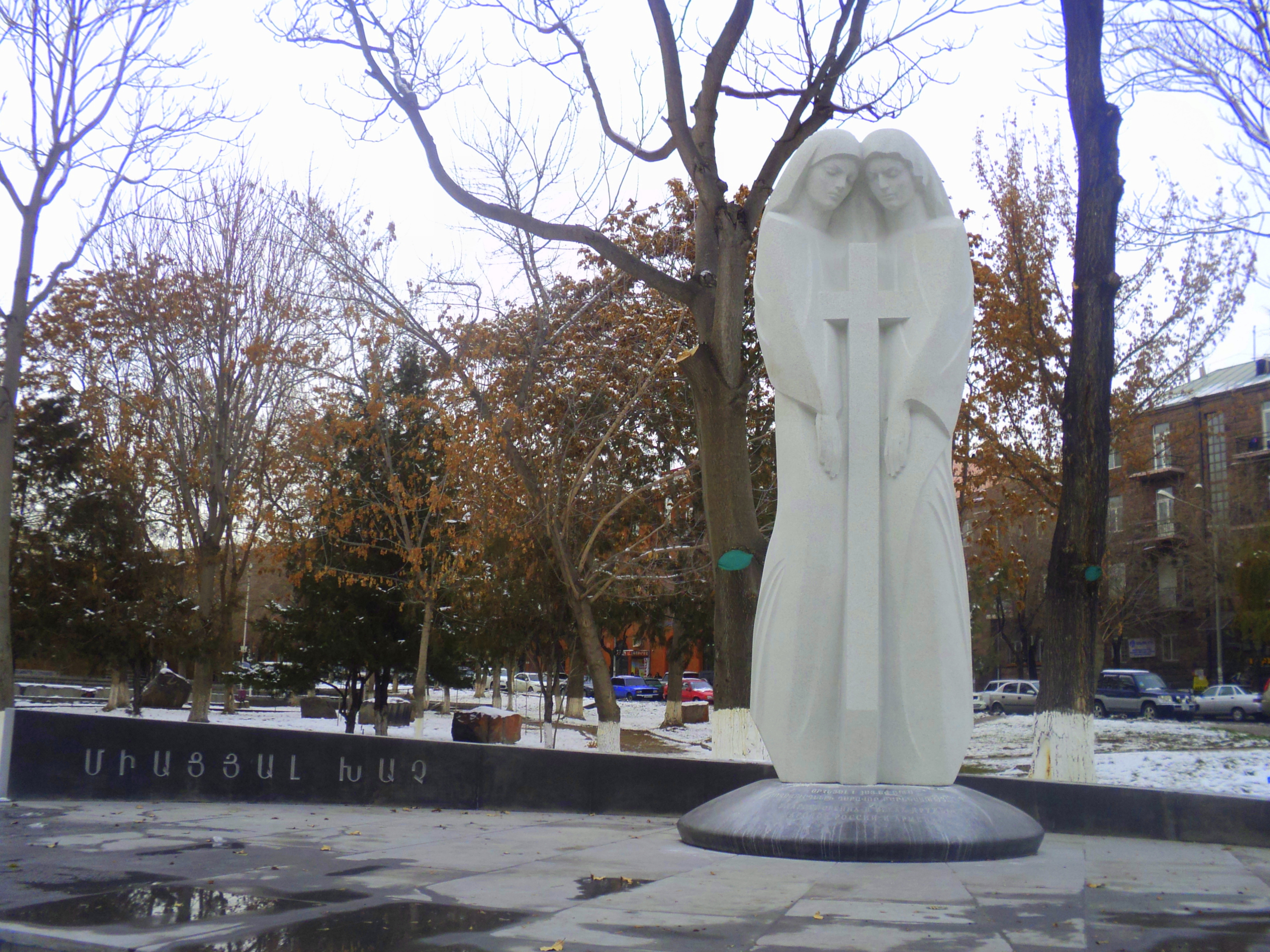 Քանդակագործ` Ֆրիդ Սողոյան